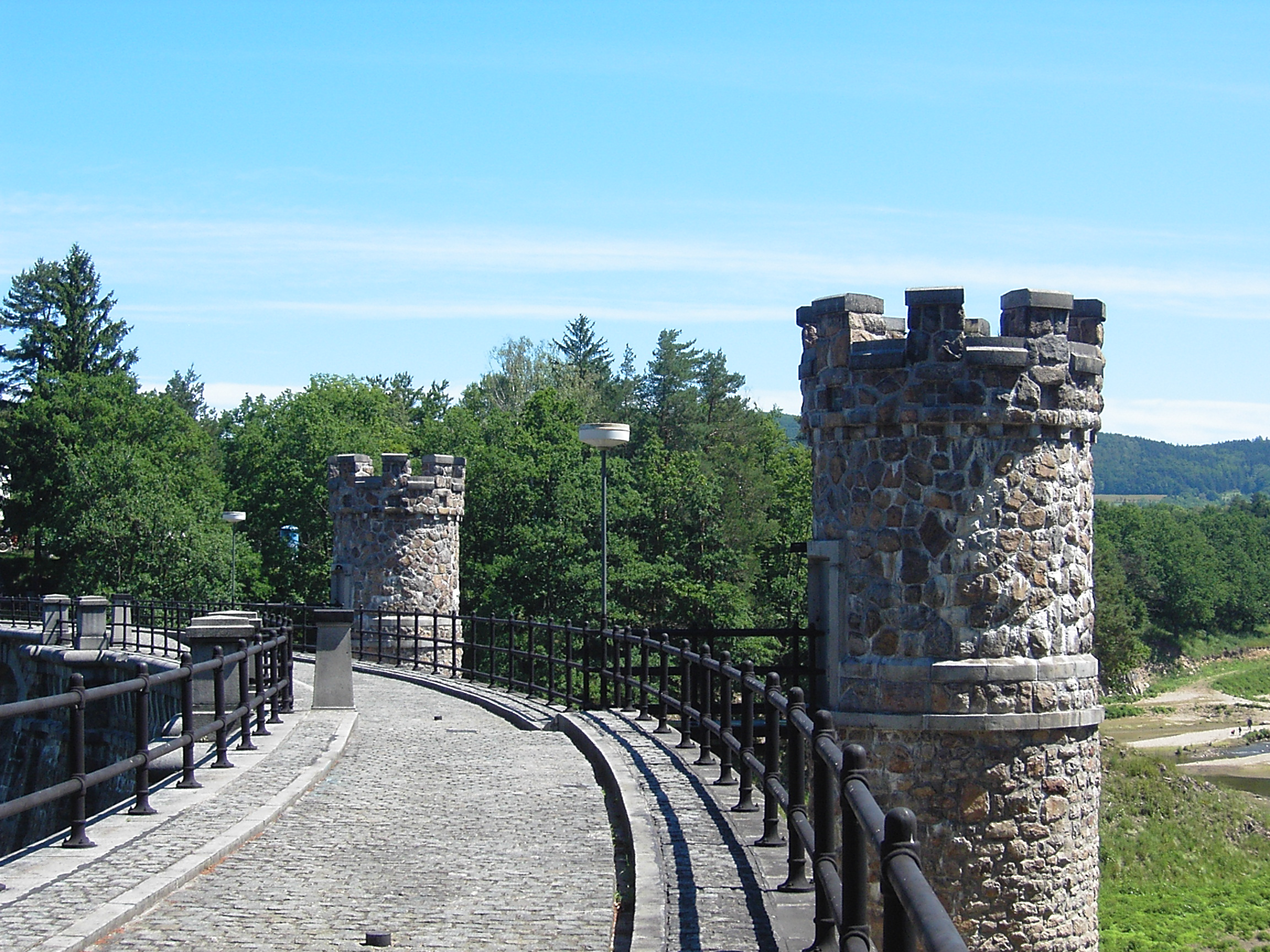 Šupátková věž nádrže Pařížov